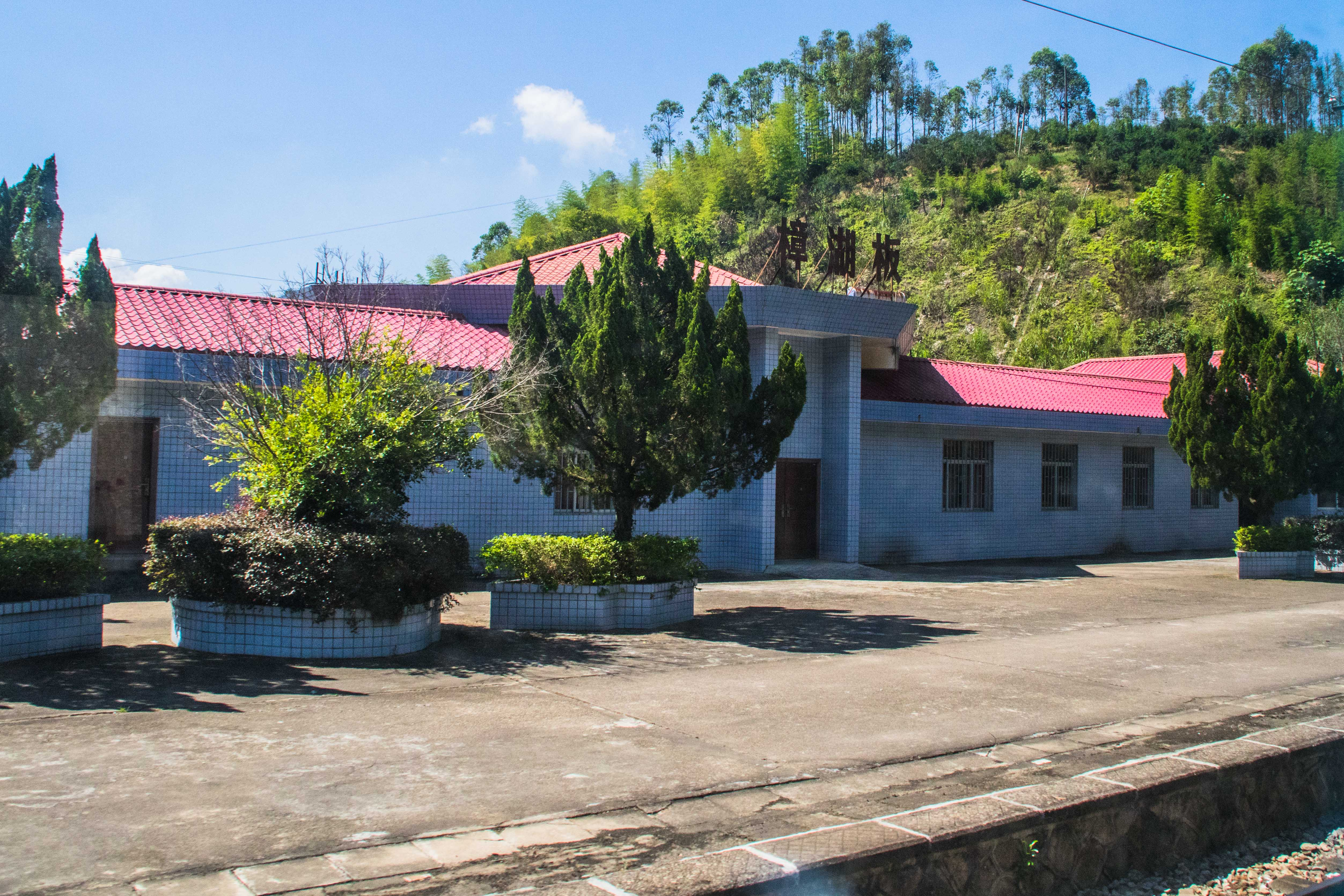 中文（中国大陆）: 樟湖板站站房